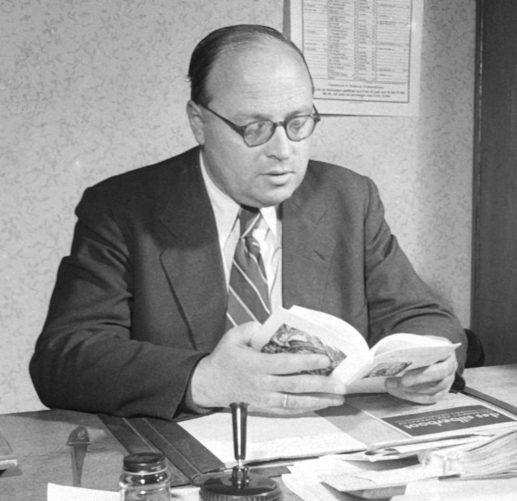 Der österreichische Schriftsteller und Lyriker Ernst Schönwiese